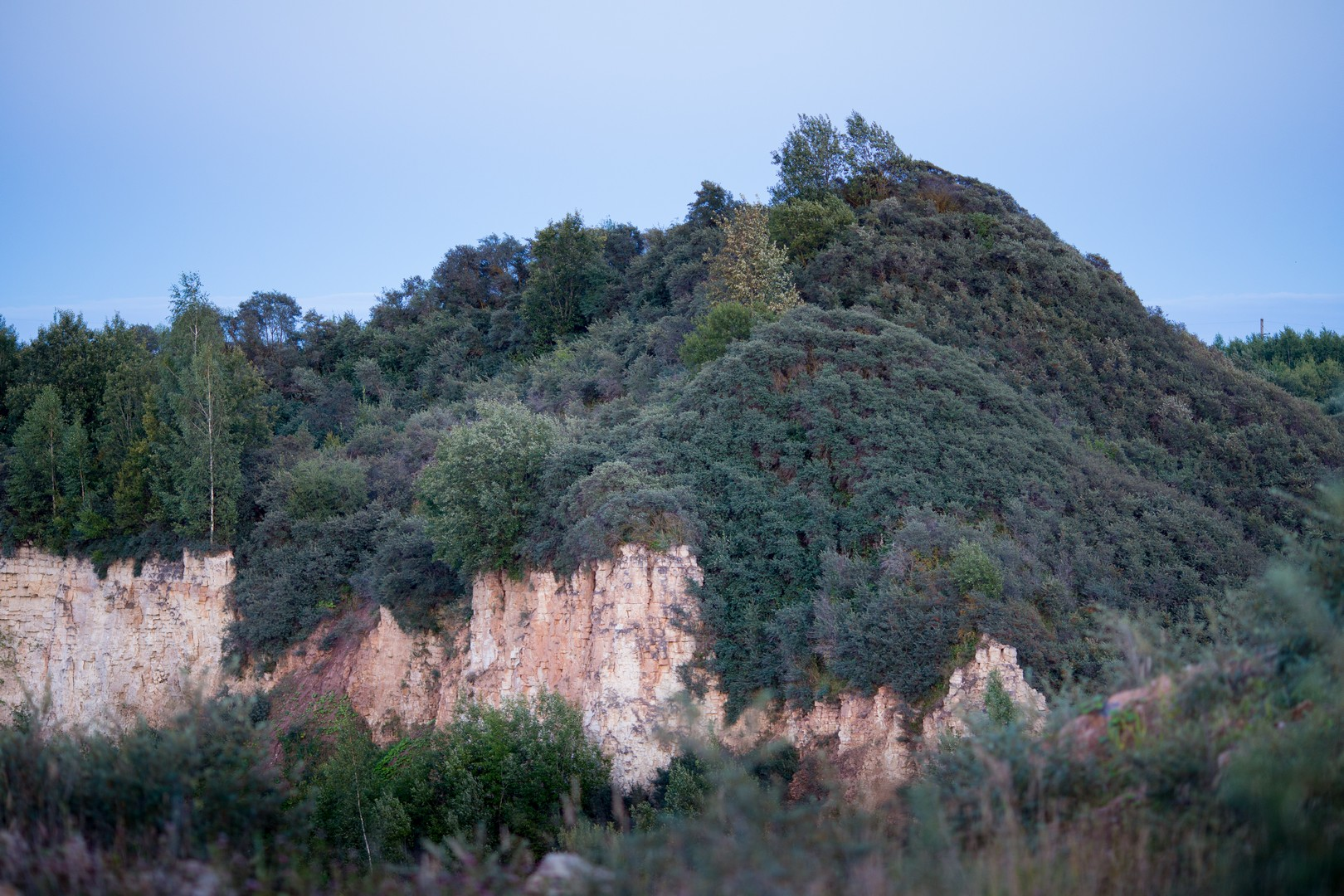 Menčių klinties telkinys